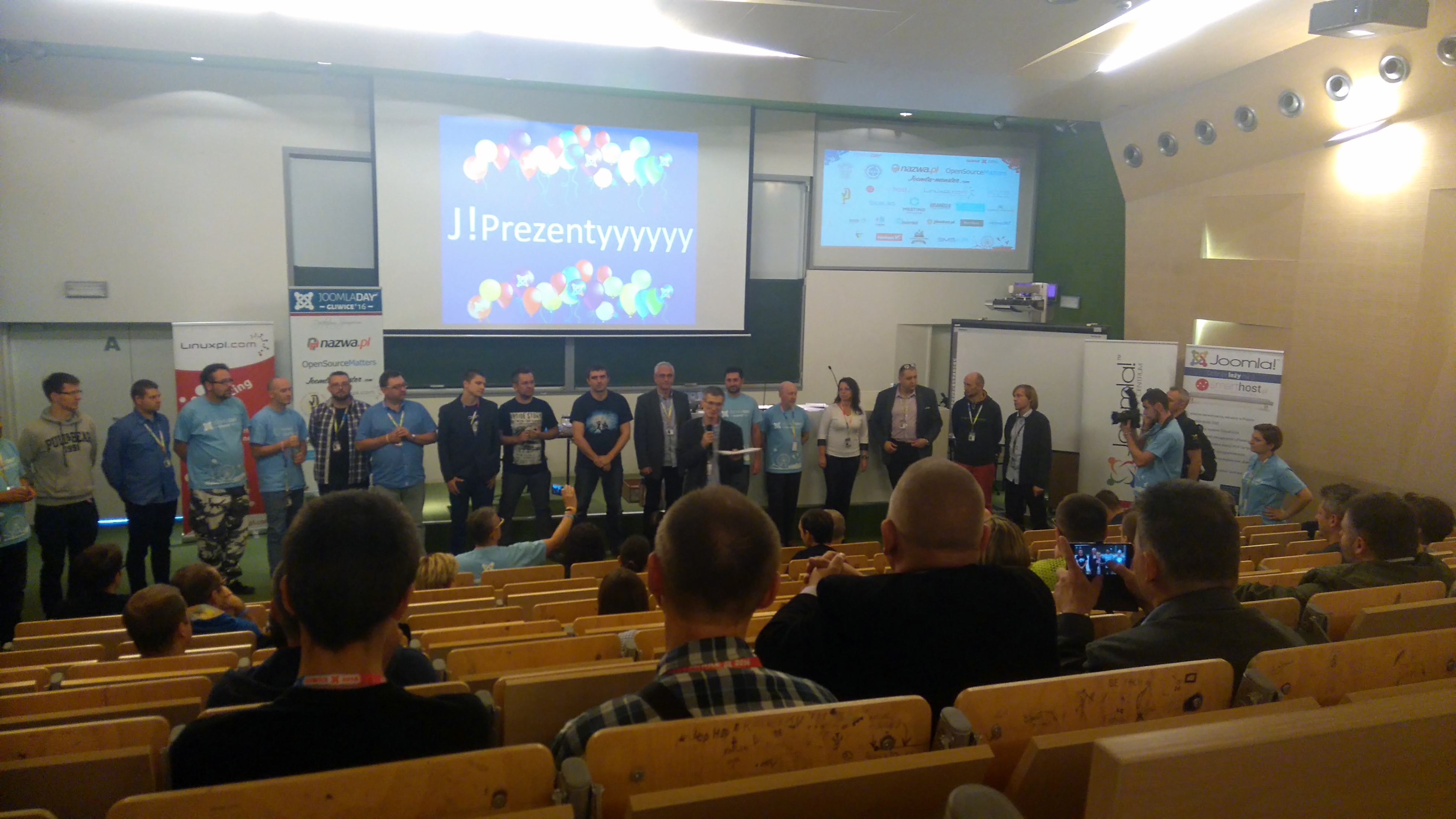 Joomla Day Poland 2016 - Gliwice - prelegenci